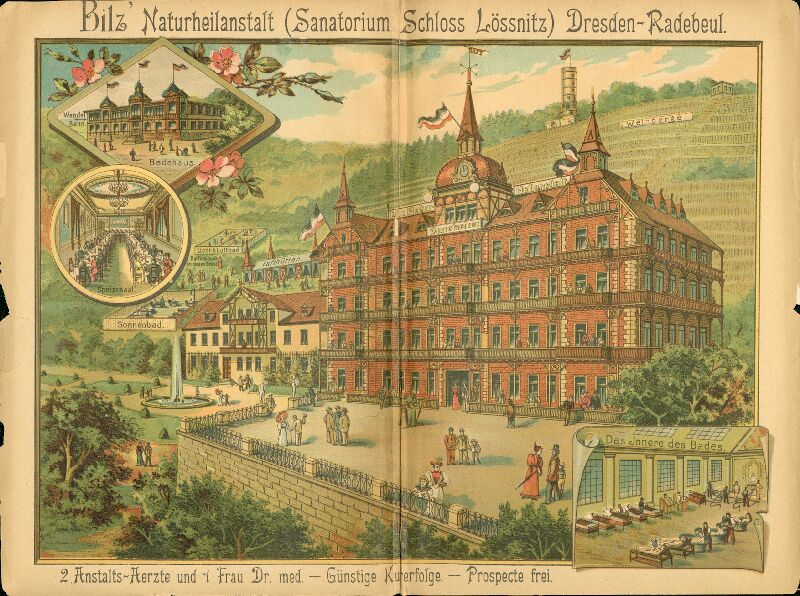 Bilz Naturheilanstalt (Sanatorium Schloss Lössnitz) - Annonce und Überblick über das ursprüngliche Gelände